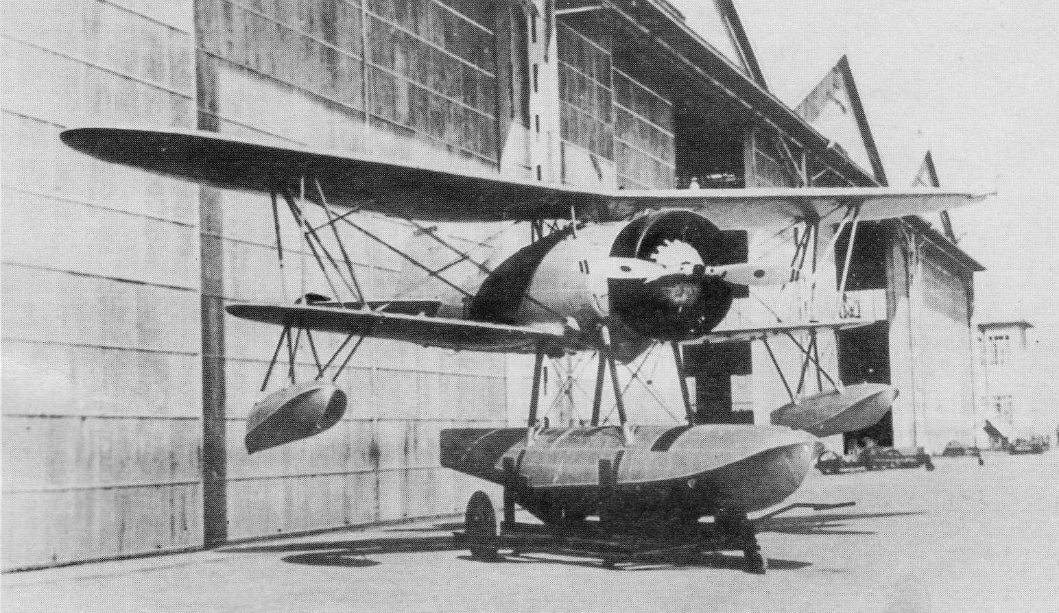 Nakajima E8N "Dave", idroricognitore biplano imbarcato catapultabile, data e luogo della scatto imprecisati.